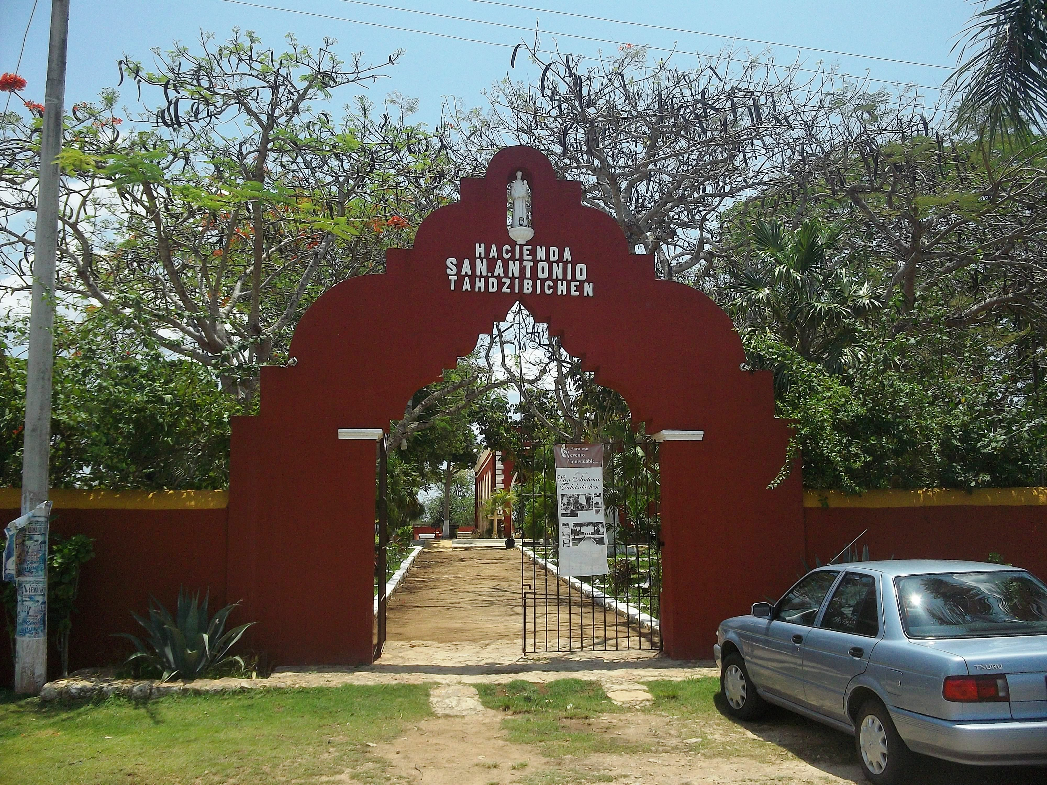 Hacienda de Tahdzibichén (Mérida), Yucatán.